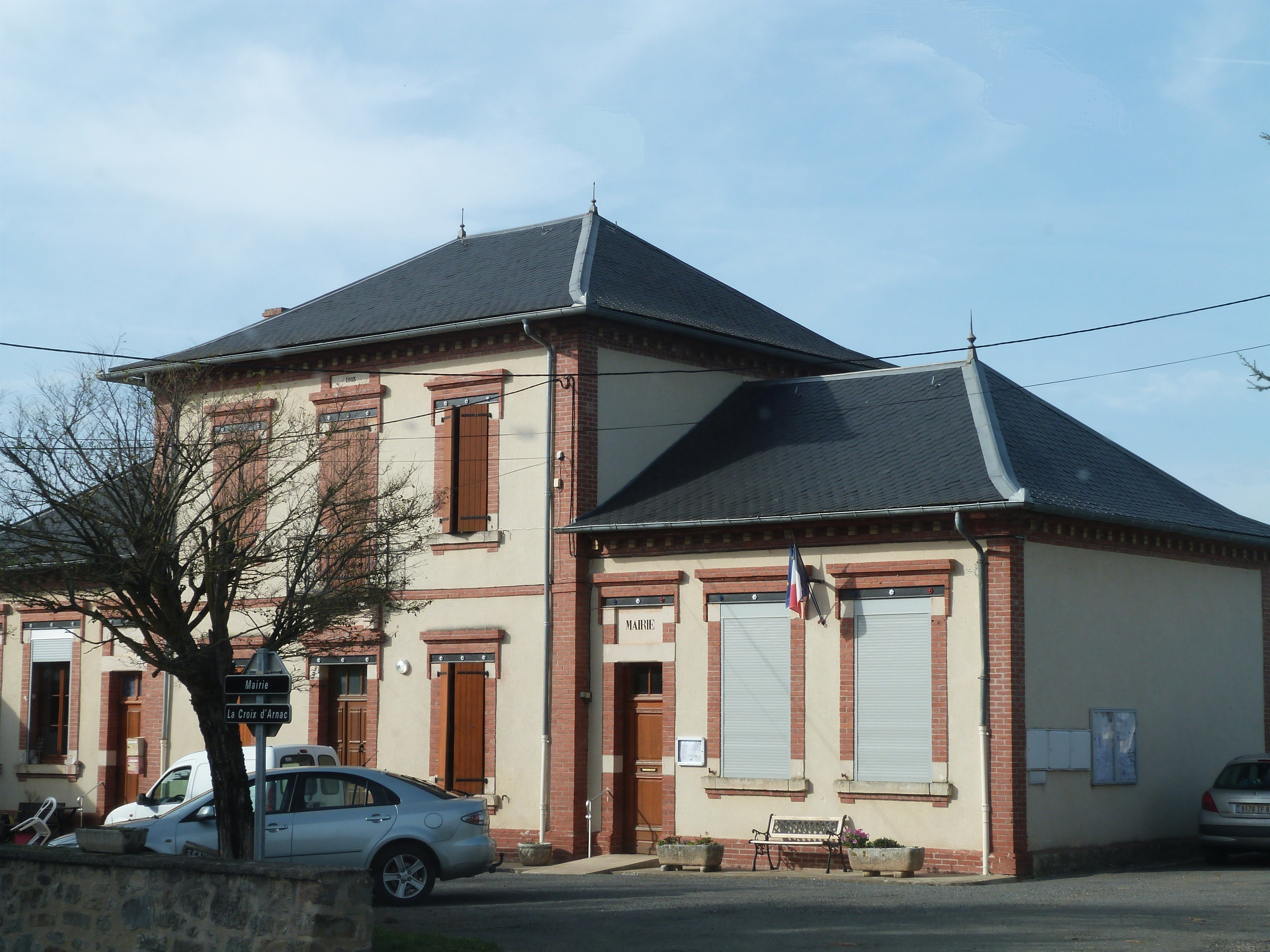 Mairie de la Lacapelle-Ségalar au lieu dit de la Croix d'Arnac